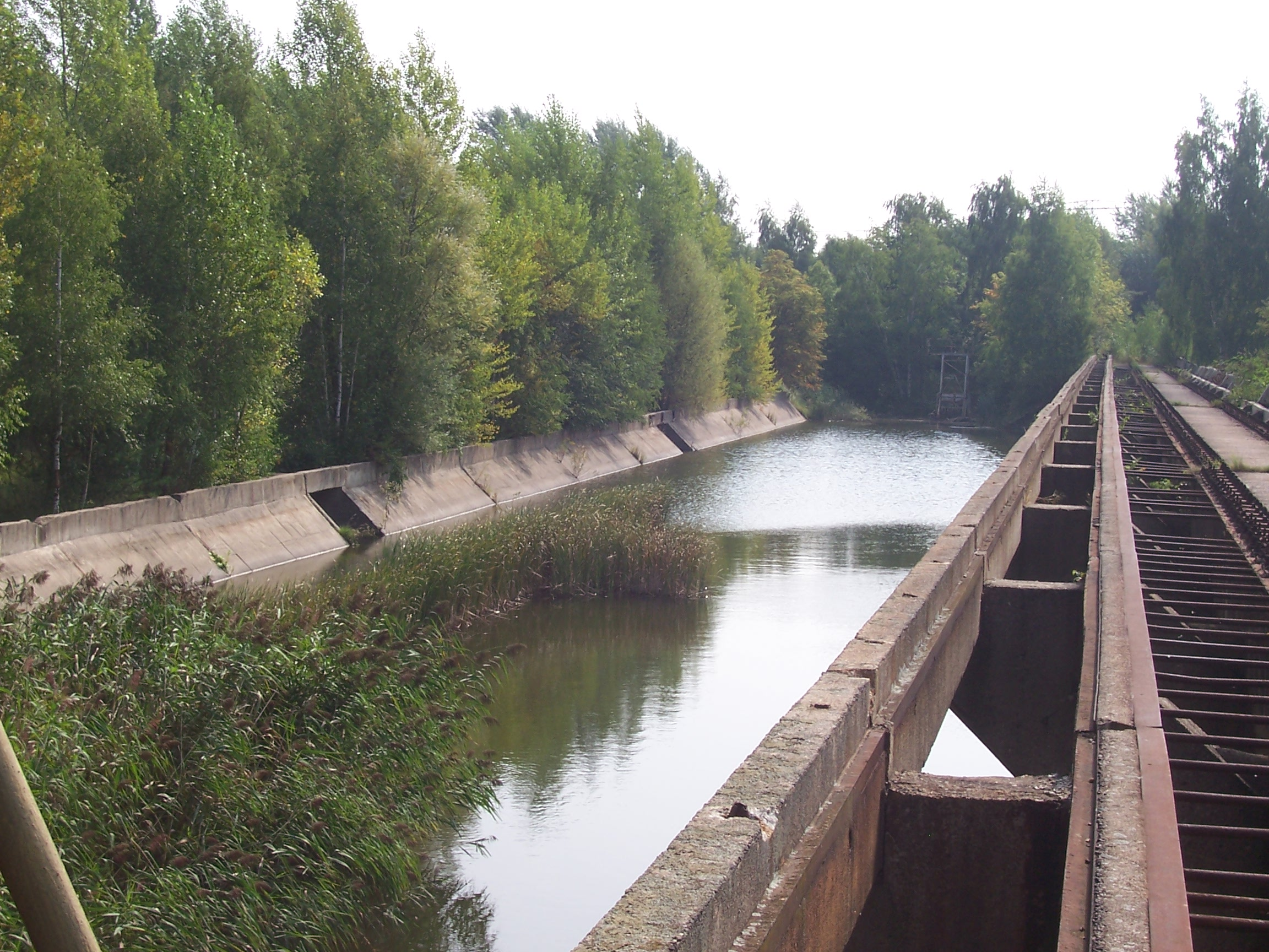 Alter ECW-Kohlebunker, rechts die Werksbahnverbindung zur Hauptbahn Leipzig-Eilenburg-Cottbus auf der Entladebrücke für die in Selbstentladewagen angelieferte Rohbraunkohle (alle Anlagen wurden 2008 abgebrochen)